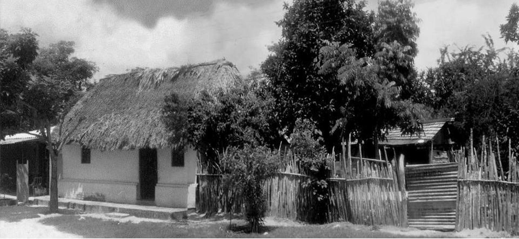 Casa de bahareque en el corregimiento de Pital de Megua